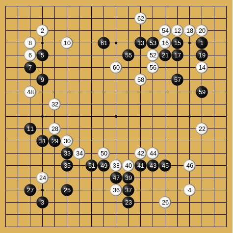 213手完、黒１目半勝